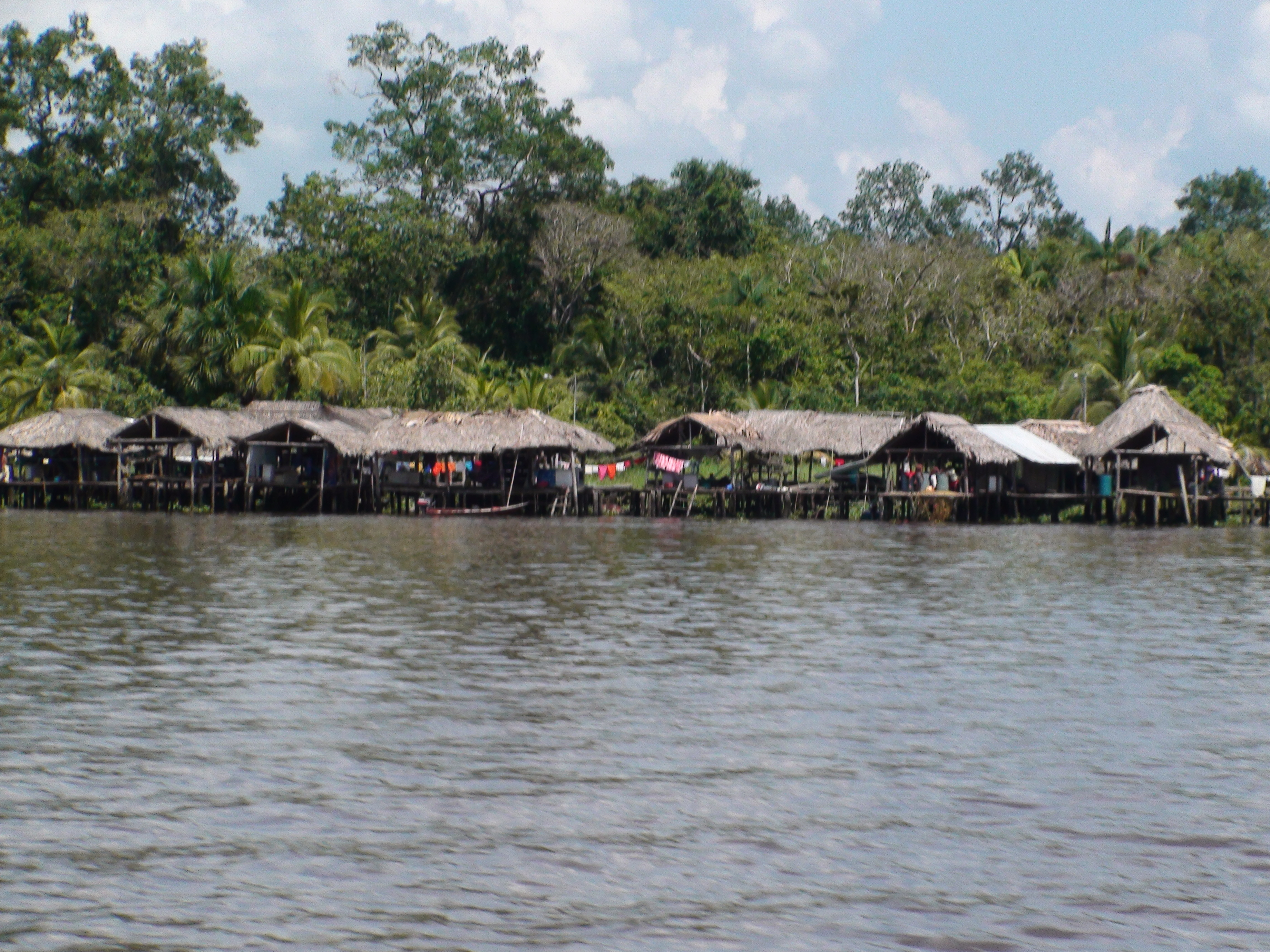 Palafitos